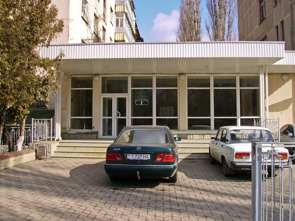 Верховный суд ПМР в Тирасполе